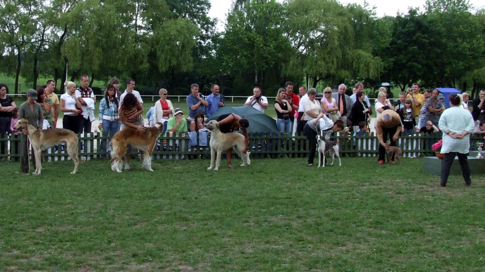 Grupa X FCI na KWPR Wałbrzych 2008